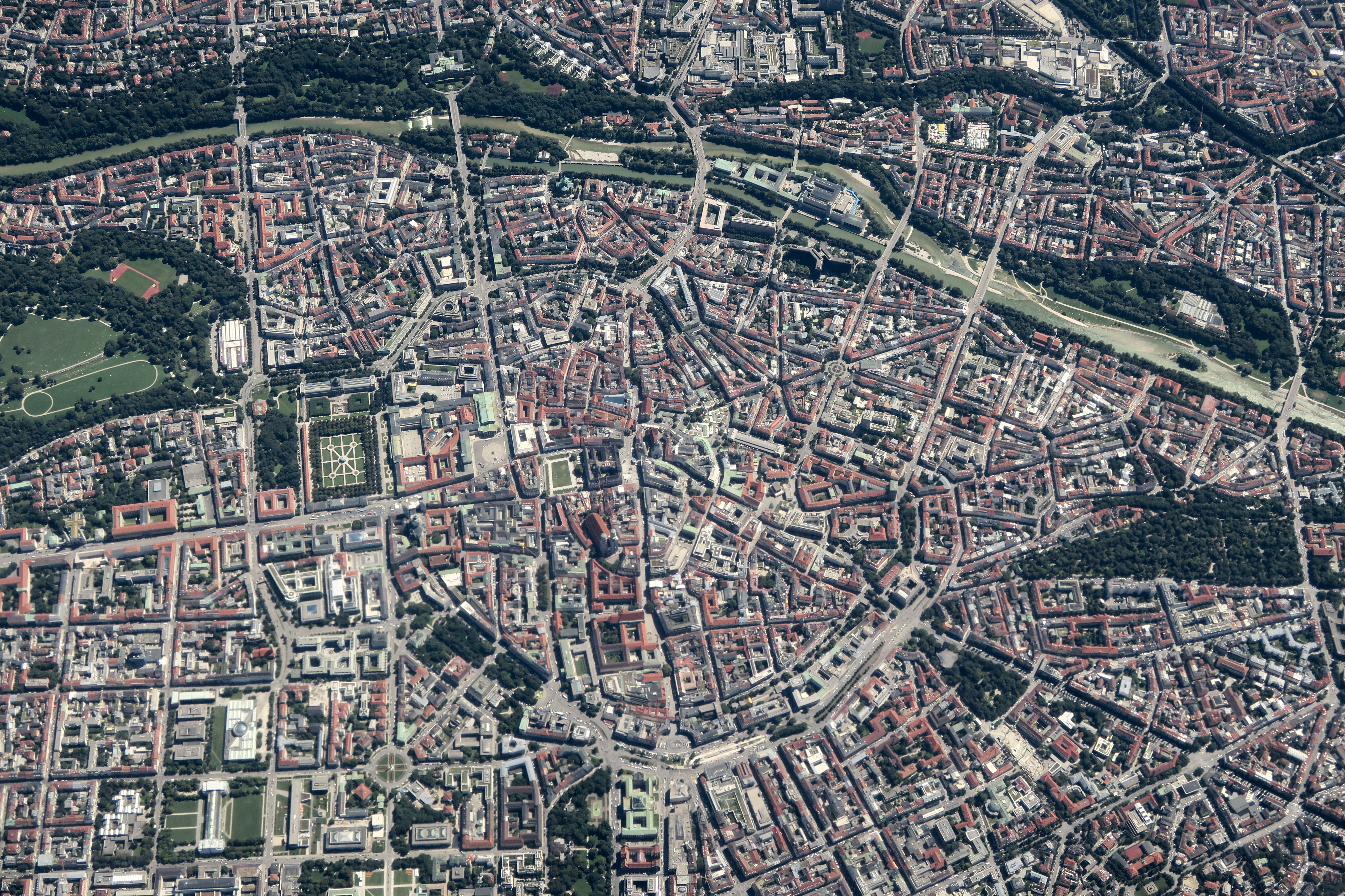 Luftbild von München. Im Bildzentrum die Münchner Innenstadt mit dem Rathausplatz, im oberen Bilddrittel die Isar, von links ragt der Englische Garten ins Bild, in der unteren Bildmitte der Stachus und rechts im Zentrum der Alte Südfriedhof. Der obere Bildrand zeigt in Richtung Osten.